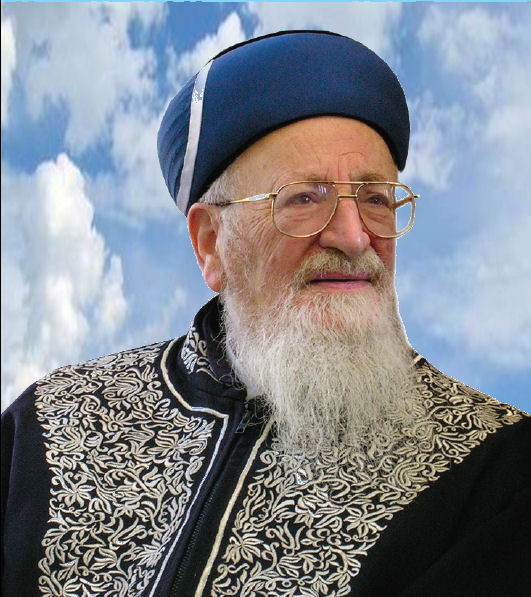 תמונתו של הרב מרדכי אליהו